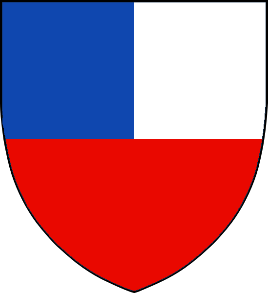 Vapensköld för danska adelsätten Viffert